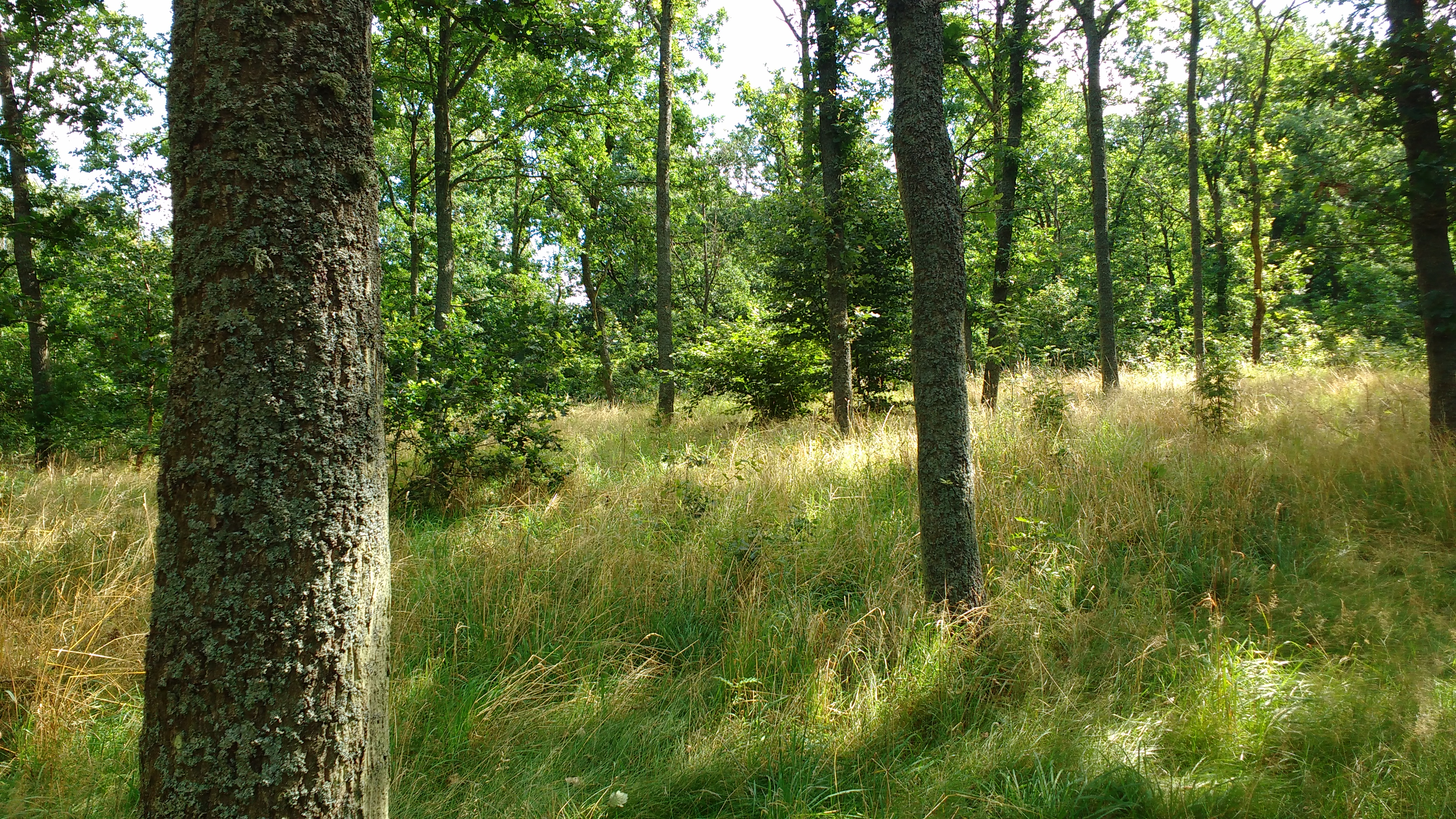 Ekskogen, Svedberga kulle, Helsingborg